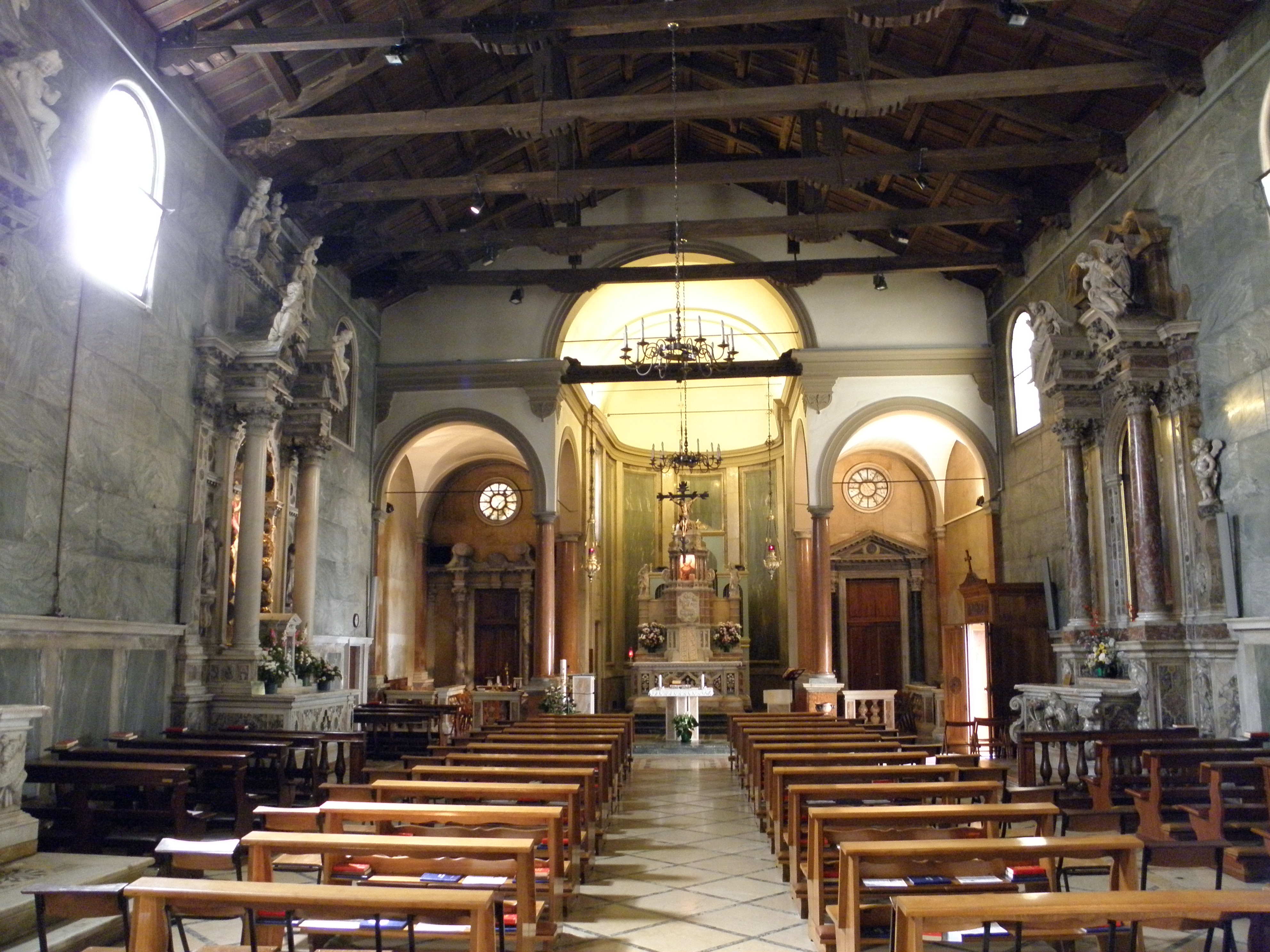 Rovigo: vista dell'altare maggiore ed abside della chiesa di Sant'Antonio Abate, popolarmente nota come San Domenico.